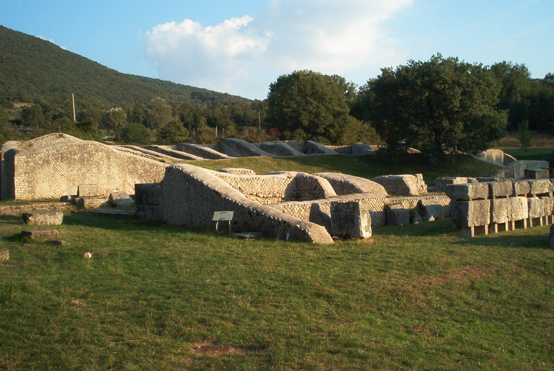 Panoramica del teatro della antica città romana di Carsulae, nei dintorni di Terni.